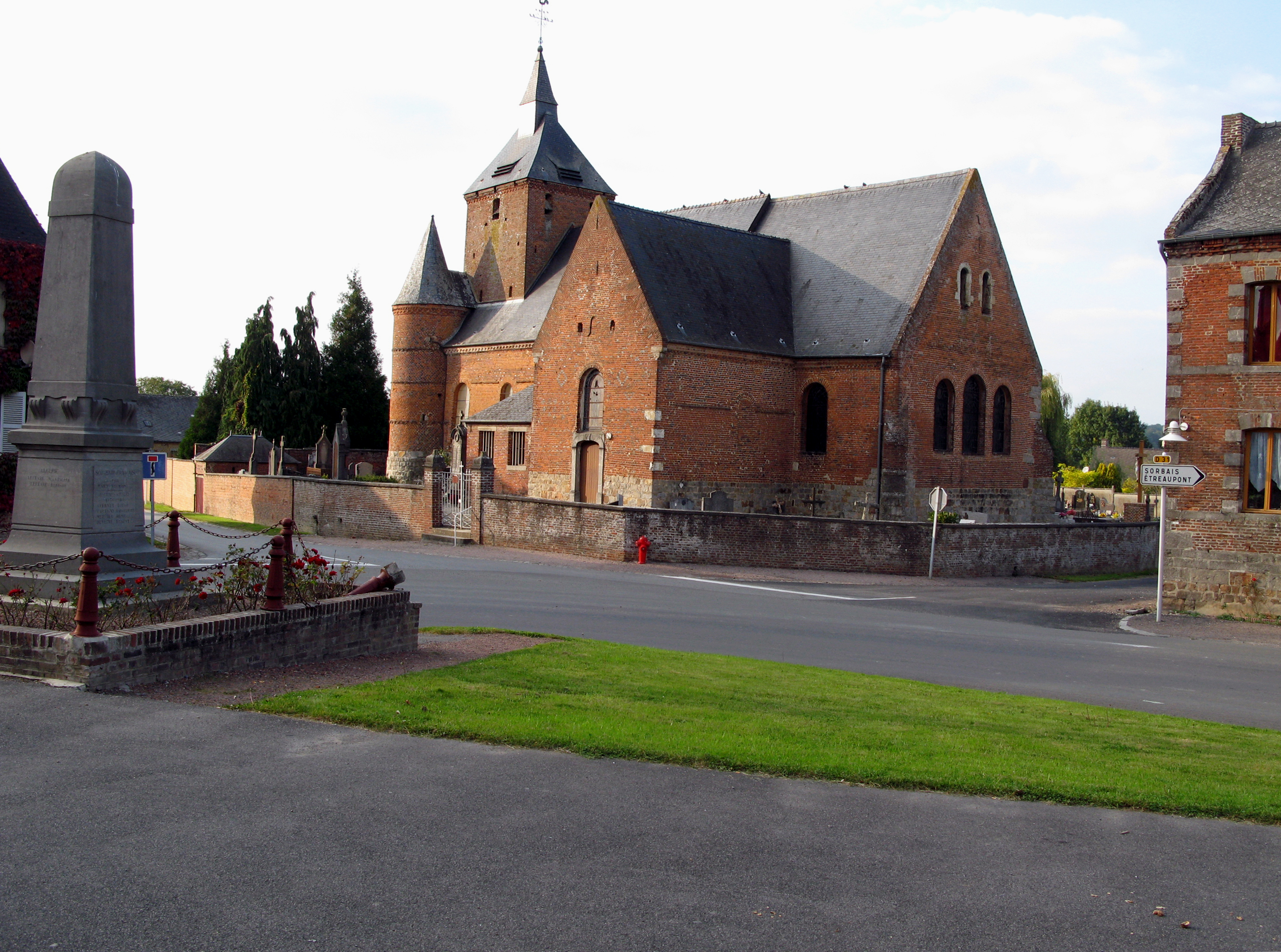 Autreppes (Aisne, France) - L'église fortifiée et le monument-aux-morts.